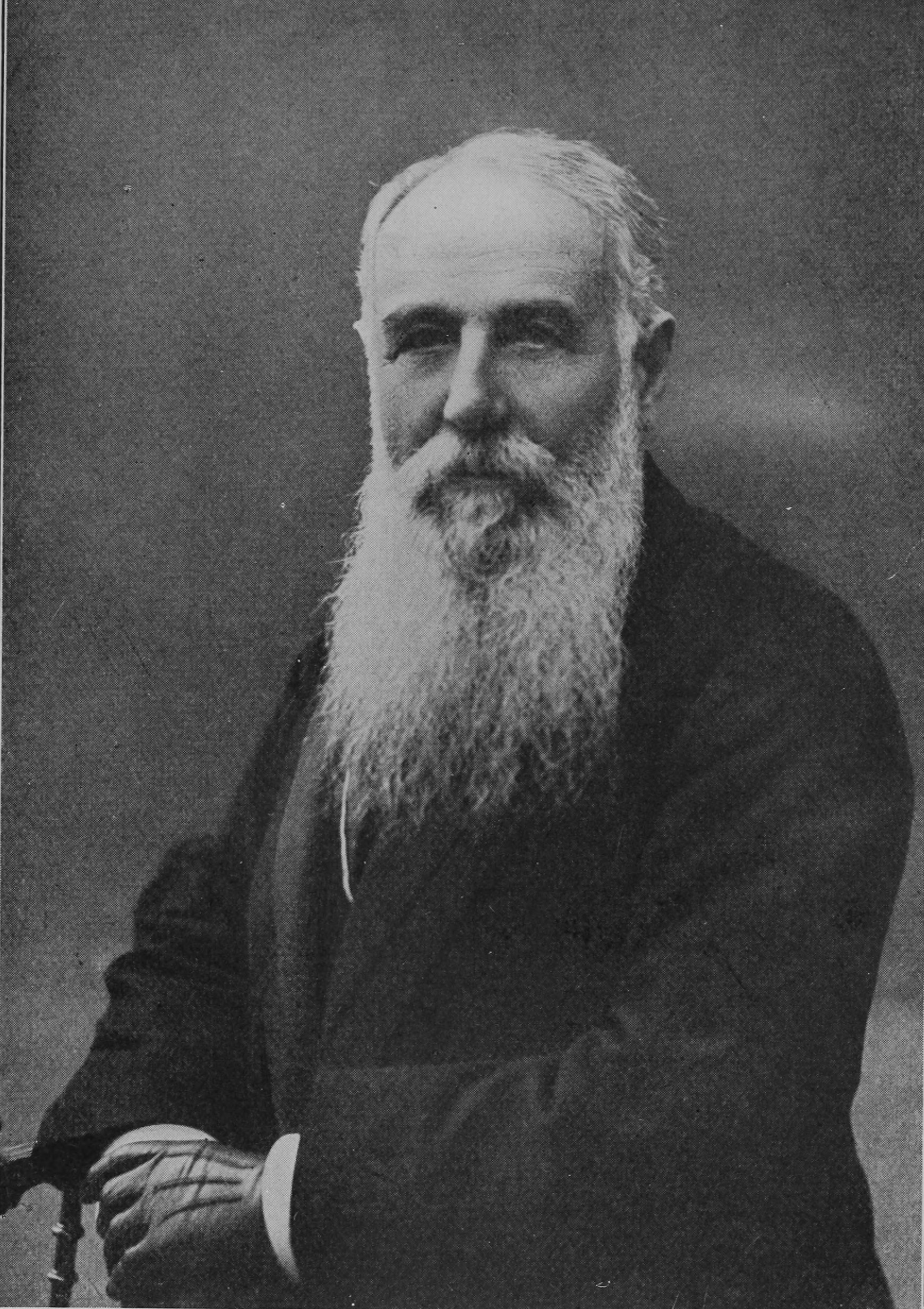 Nikola Pašić, político serbio y yugoslavo.